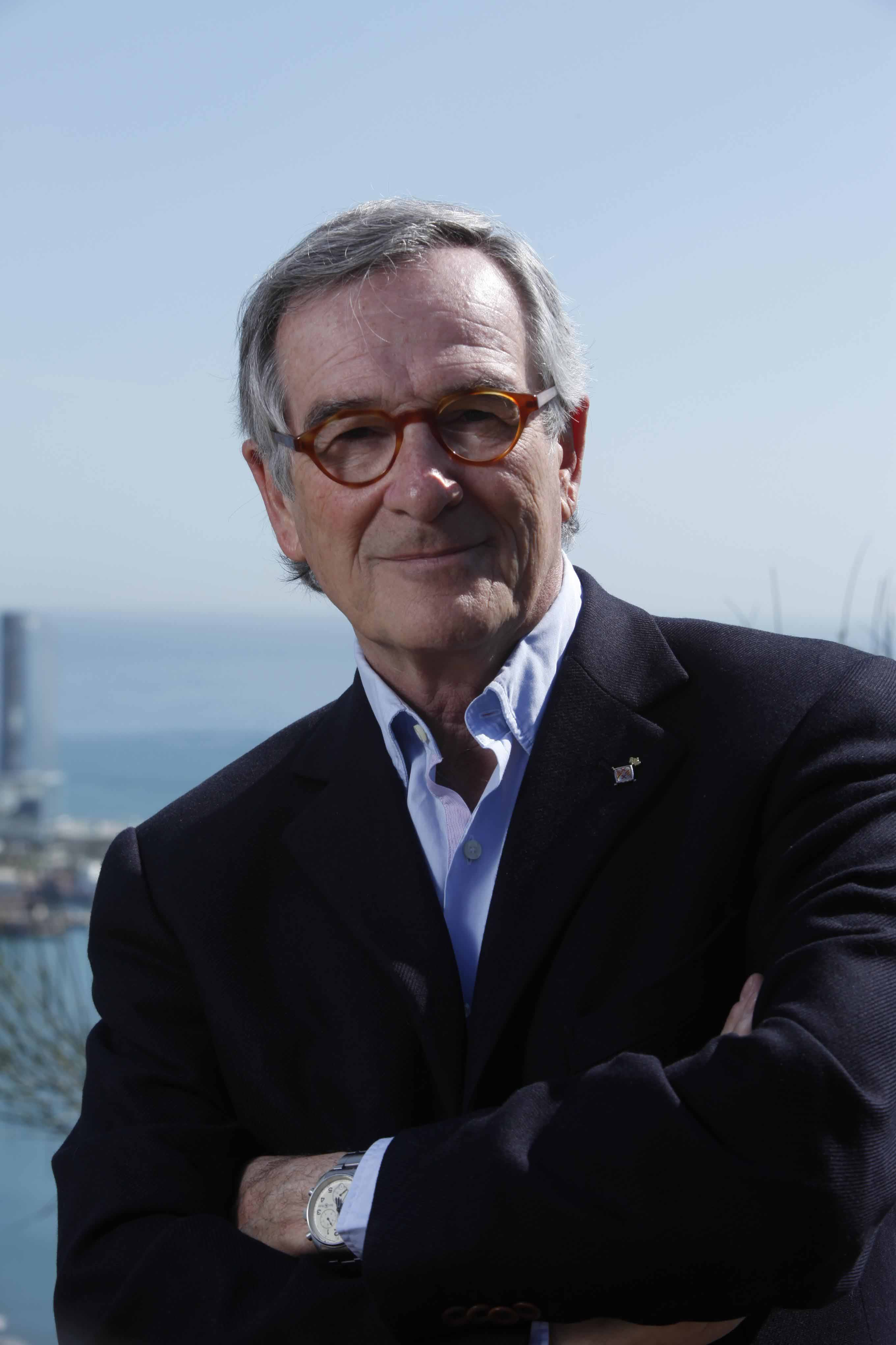 Xavier Trias, Presidència Comissió Nacional de Política Municipal.